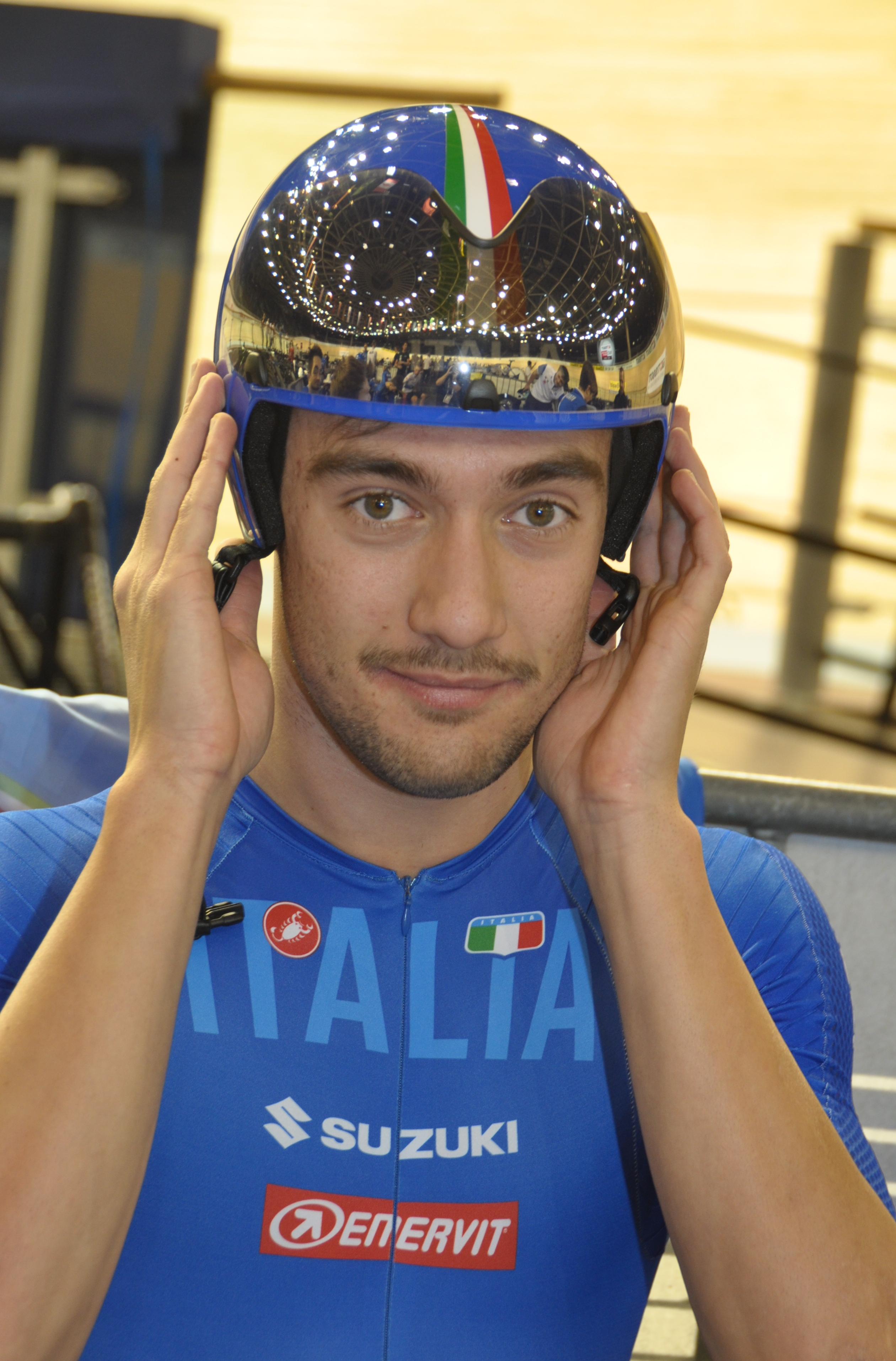 Carloalberto Giordani, italienischer Radsportler